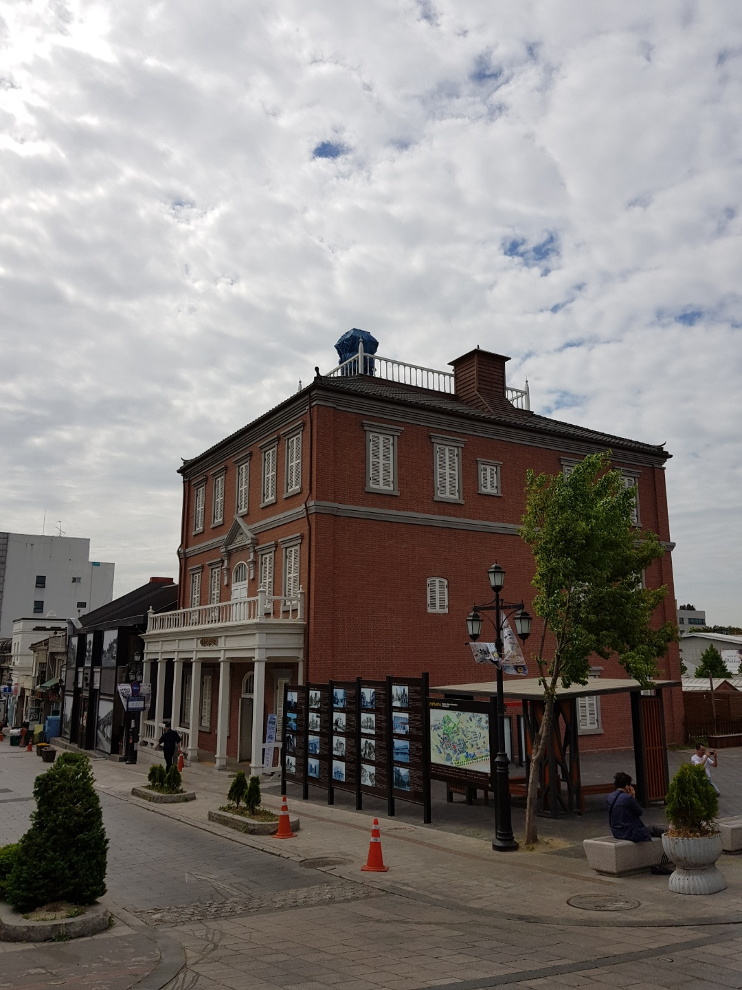 인천 차이나타운에 위치한 호텔이다. 우리나라 최초의 호텔이며 처음으로 커피가 보급되었던 곳이기도 하다.